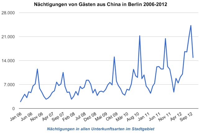 Beispiel einer von TourMIS generierten Grafik